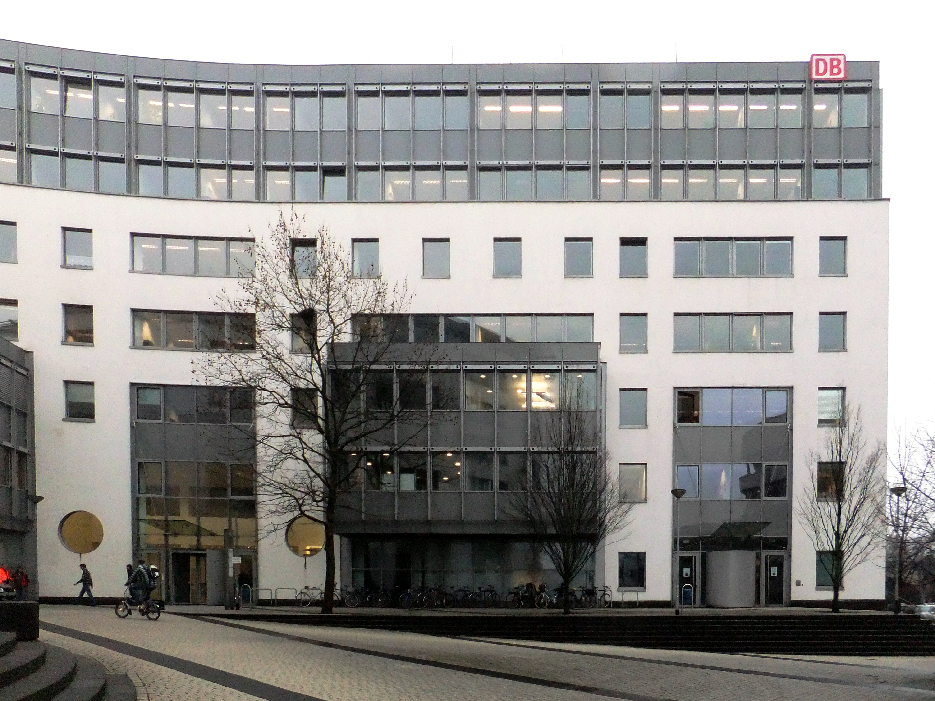 Die Betriebszentrale des Regionalbereichs Mitte und die Netzleitzentrale der DB Netz AG in Frankfurt am Main (Pfarrer-Perabo-Platz 4)